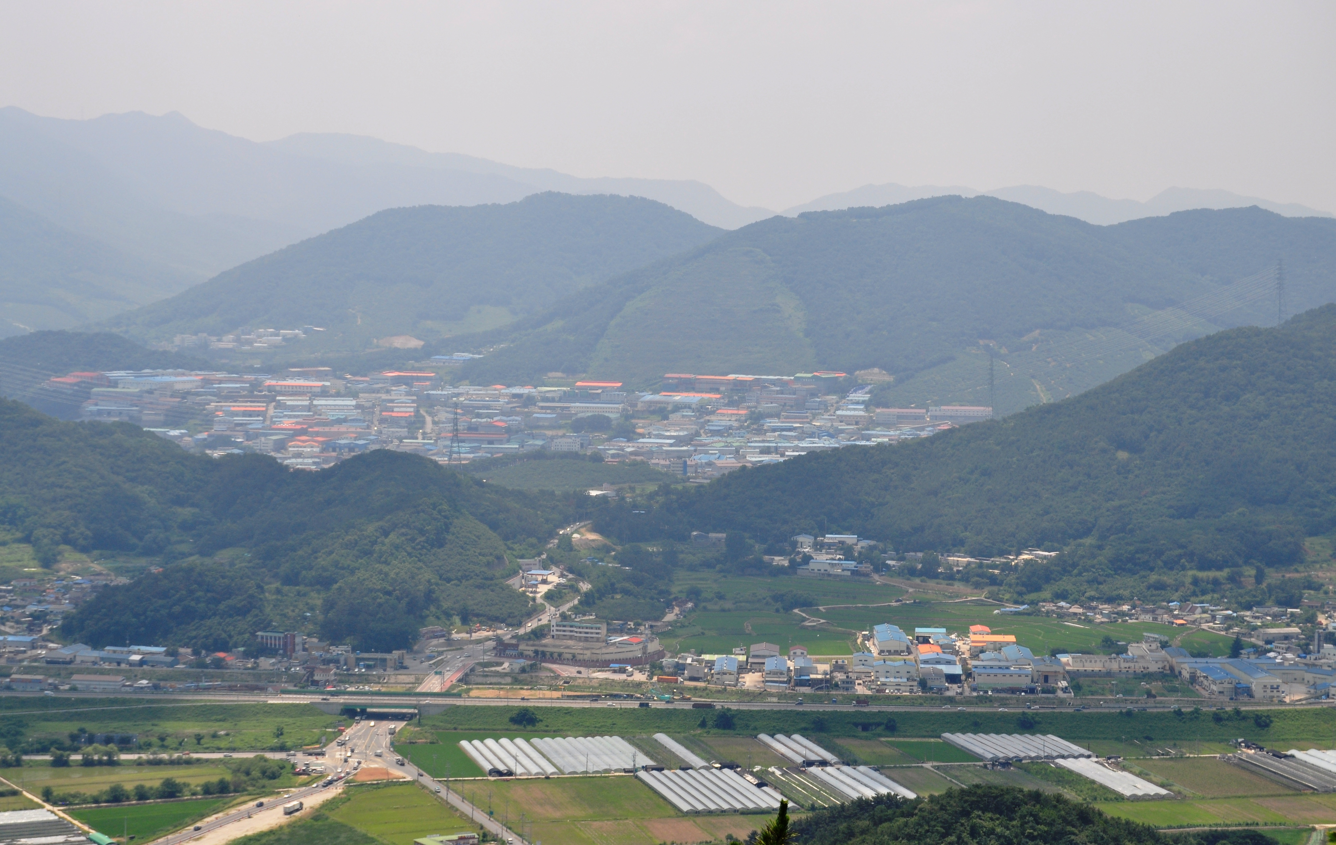 주촌면 일대 (천곡리, 주촌교차로, 선지리 등)